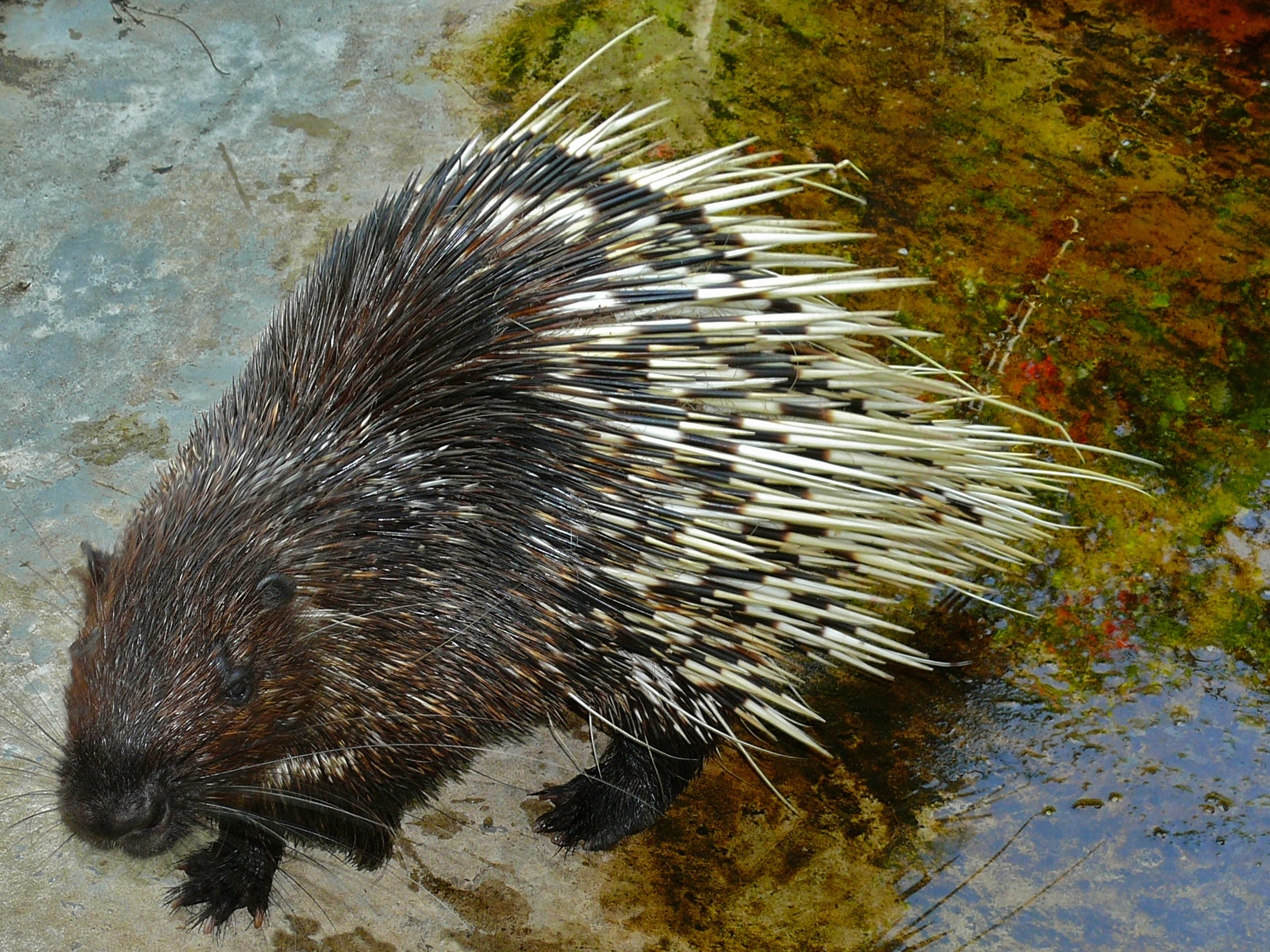 Miri Crocodile Farm, Sarawak, MALAYSIA